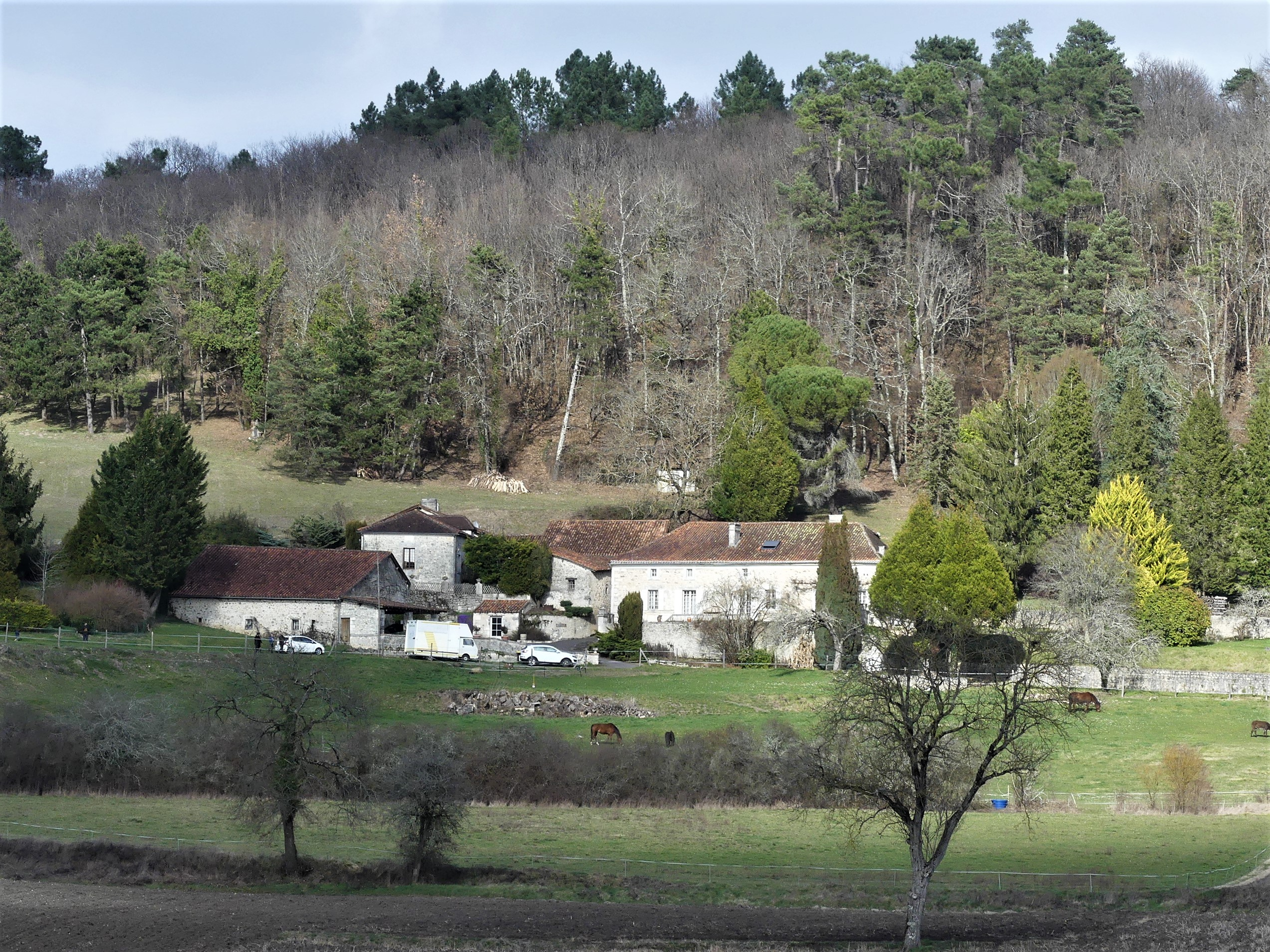 Le lieu-dit Champagne, Saint-Crépin-de-Richemont, Dordogne, France.